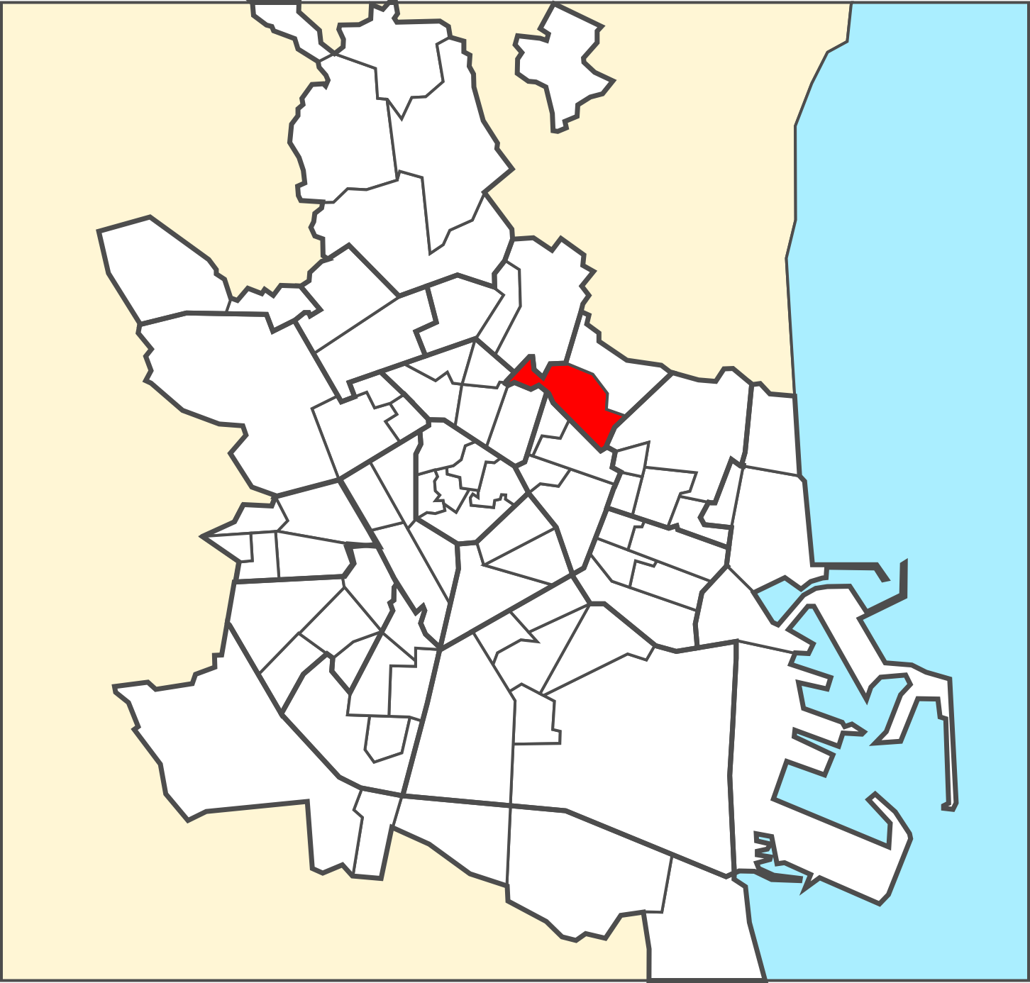 Localització del barri dins de la ciutat de València.